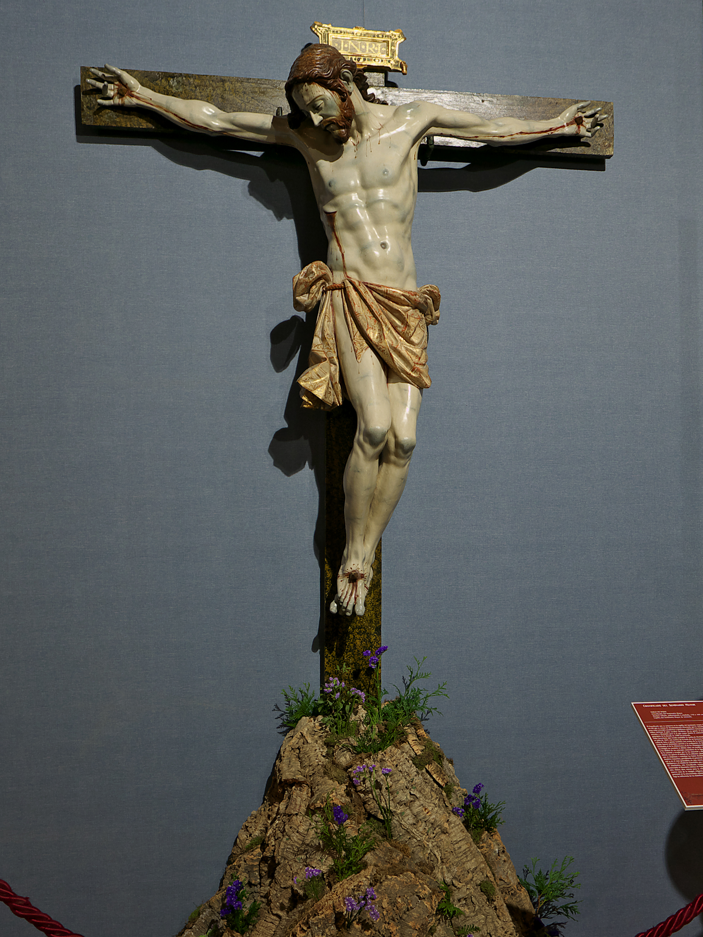 Presencia: 400 años con los desamparados, Iglesia Conventual del Santo Ángel (Sevilla). Escultura fundamental de la Escuela granadina de escultura. Pablo de Rojas (h. 1580) arrastra el modelo miguelangelesco al que modifica con rasgos naturalistas que transmiten la aceptación serena de la crucifixión de Cristo. Madera policromada y estofada por Pedro de Raxis. Marcelo venusti, crocifissione da michelangeloú